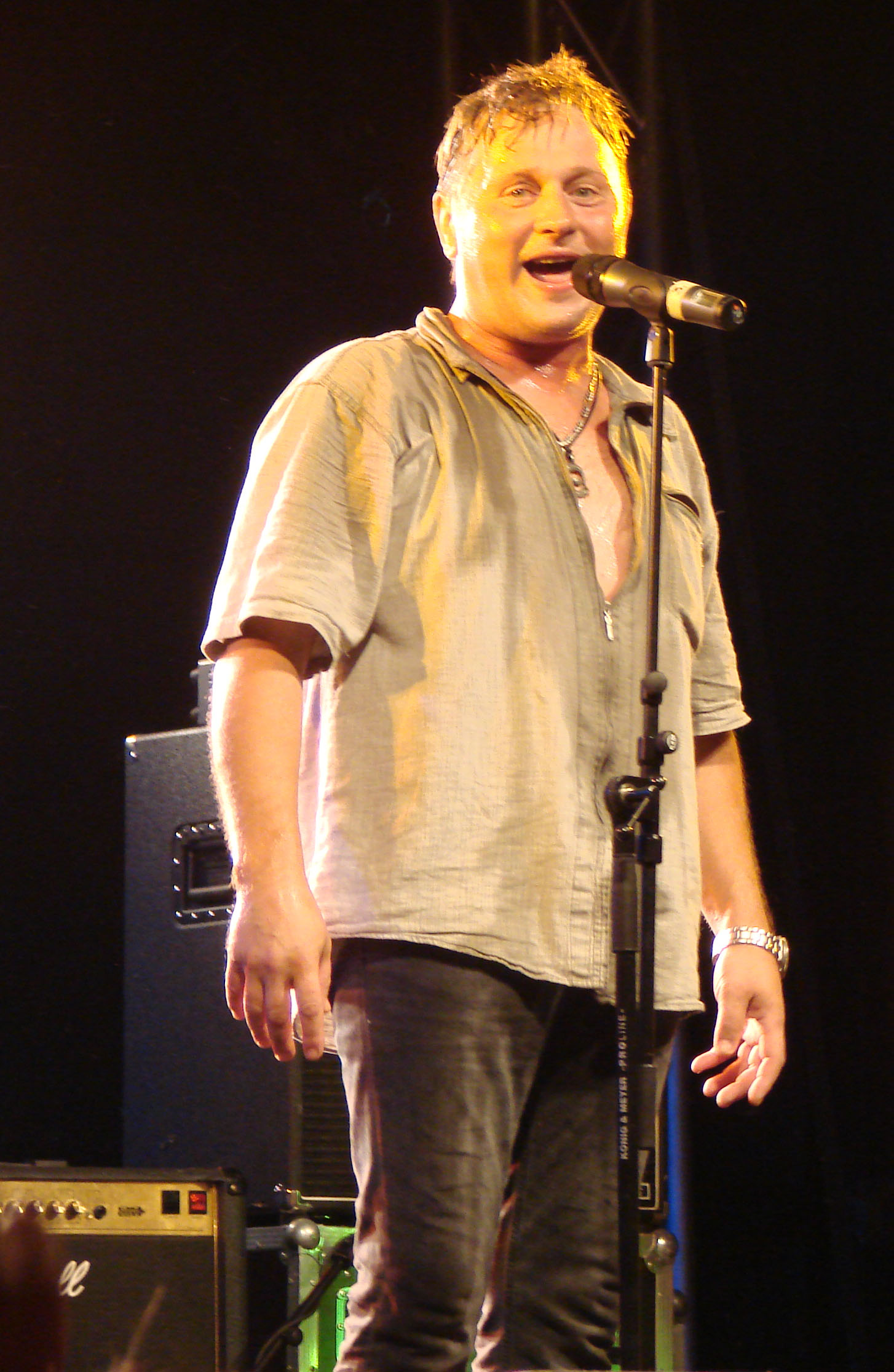 Alex dzied Saldus saulē 2008. gada 2. augustā